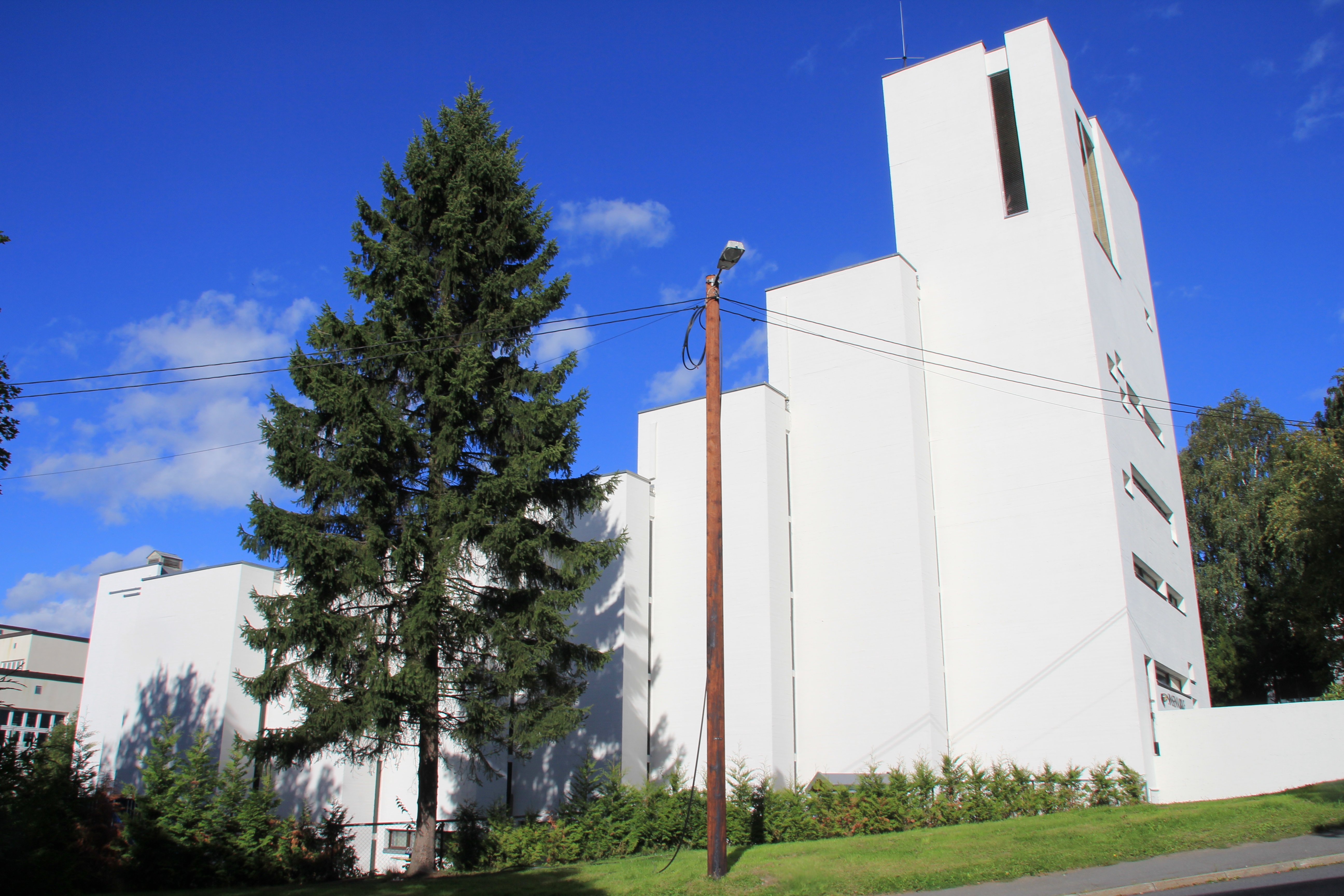 Sinsen kirke er fra 1970 i Oslo. Fasade mot sør.